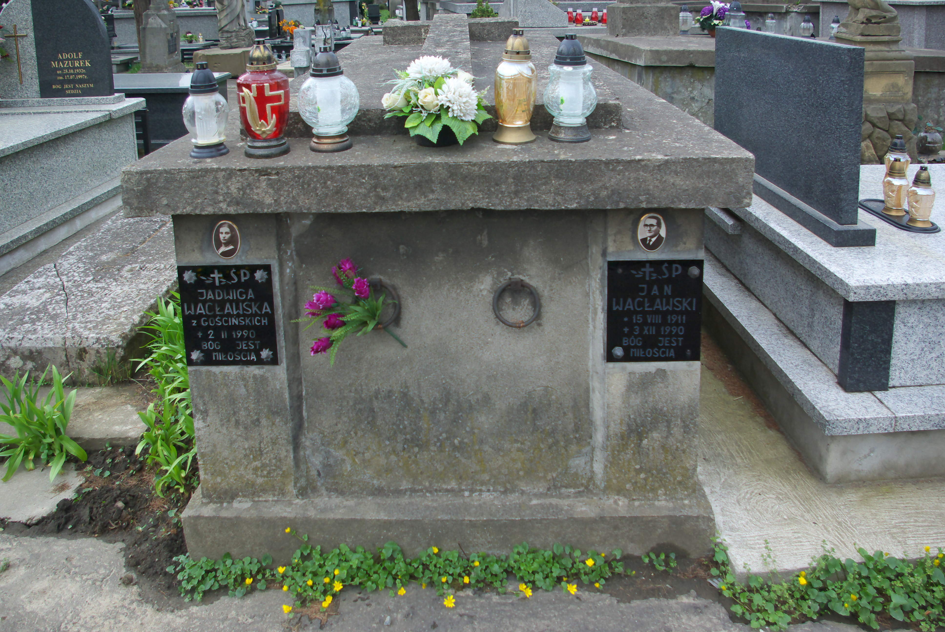 Grobowiec Jadwigi i Jana Wacławskich na Cmentarzu Centralnym w Sanoku.